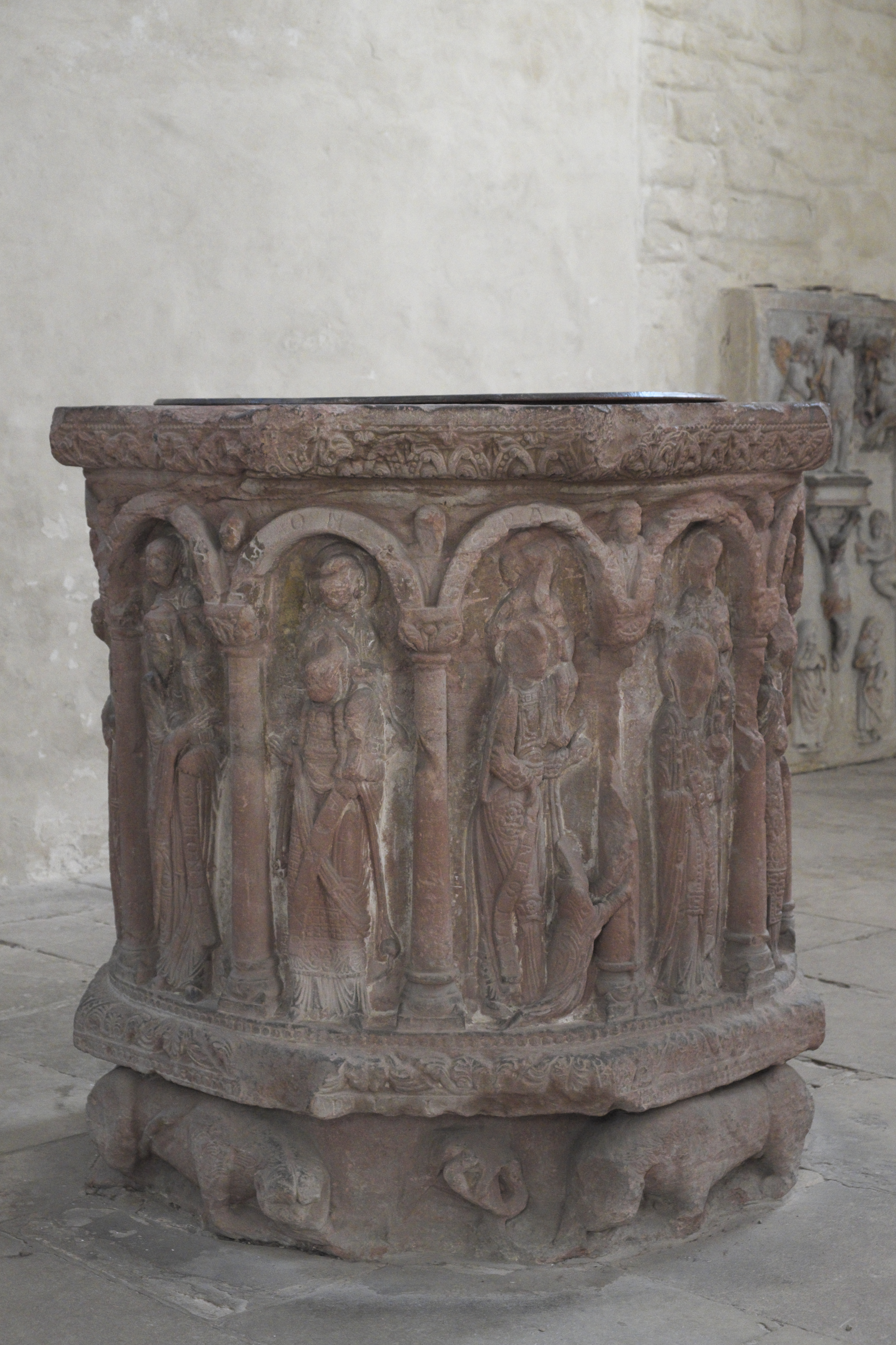 Dom St. Johannes und St. Laurentius in Merseburg im Saalekreis in Sachsen-Anhalt/Deutschland, Taufbecken aus St. Thomas in Neumarkt, um 1180; Darstellung: Zwölf Propheten tragen auf ihren Schultern die zwölf Apostel